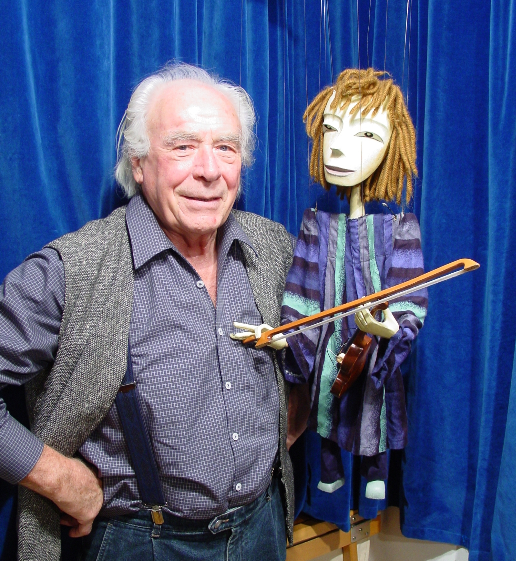 Dieter Kieselstein, Puppenbauer und -spieler, im Januar 2006.